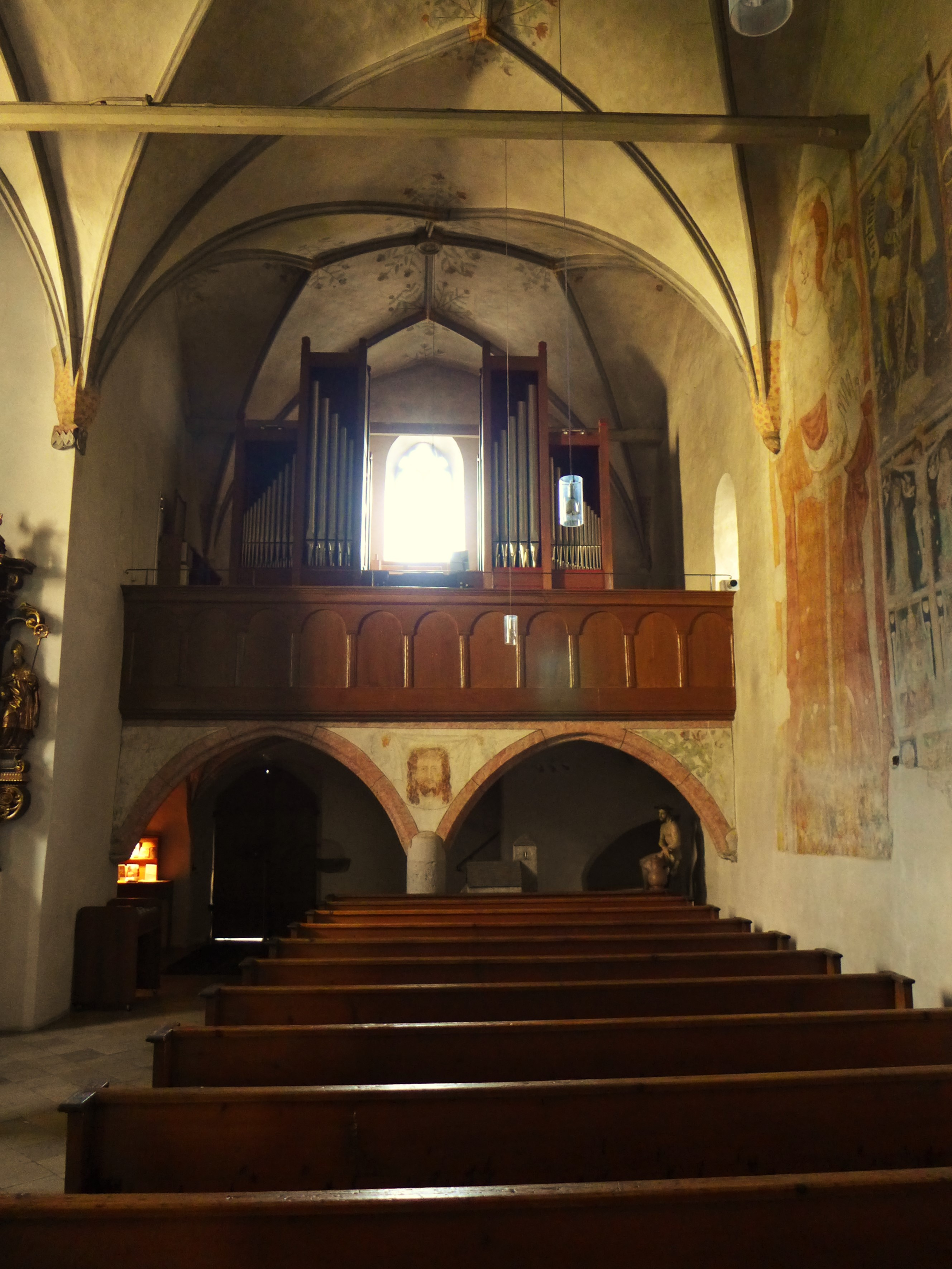 Alte Pfarrkirche St. Martin (Garmisch-Partenkirchen), Blick zur Orgelempore